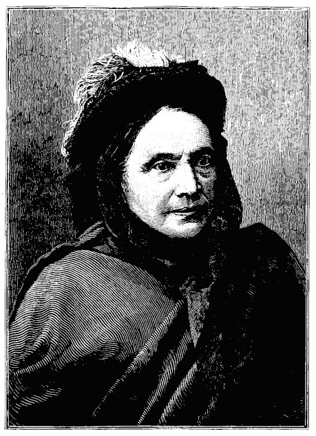 Forfatterinden Marie Colban, fra Illustreret Tidende, 13. april 1884